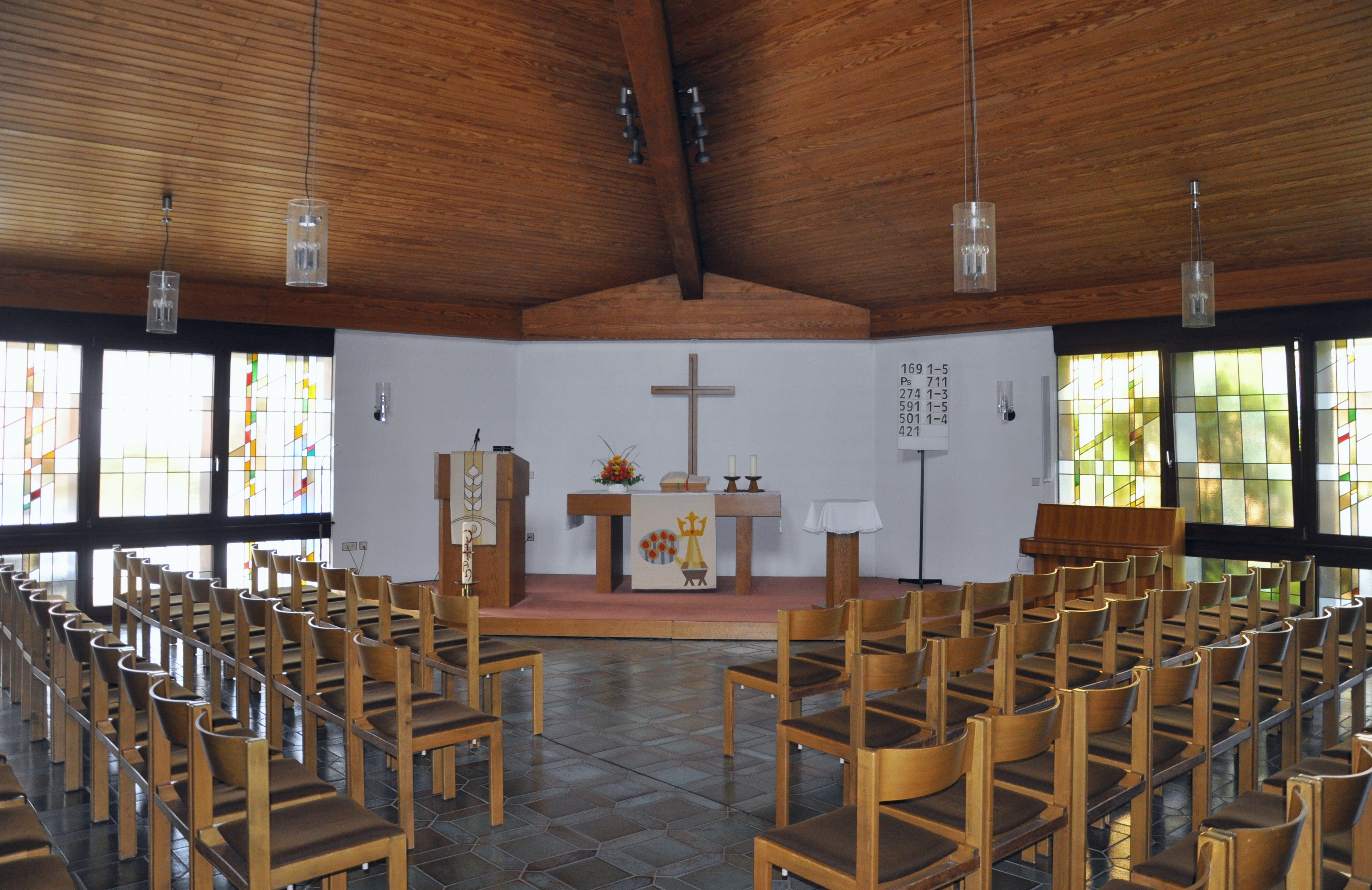 Friedrichshafen, Evangelisches Gemeindezentrum Ailingen, Saal